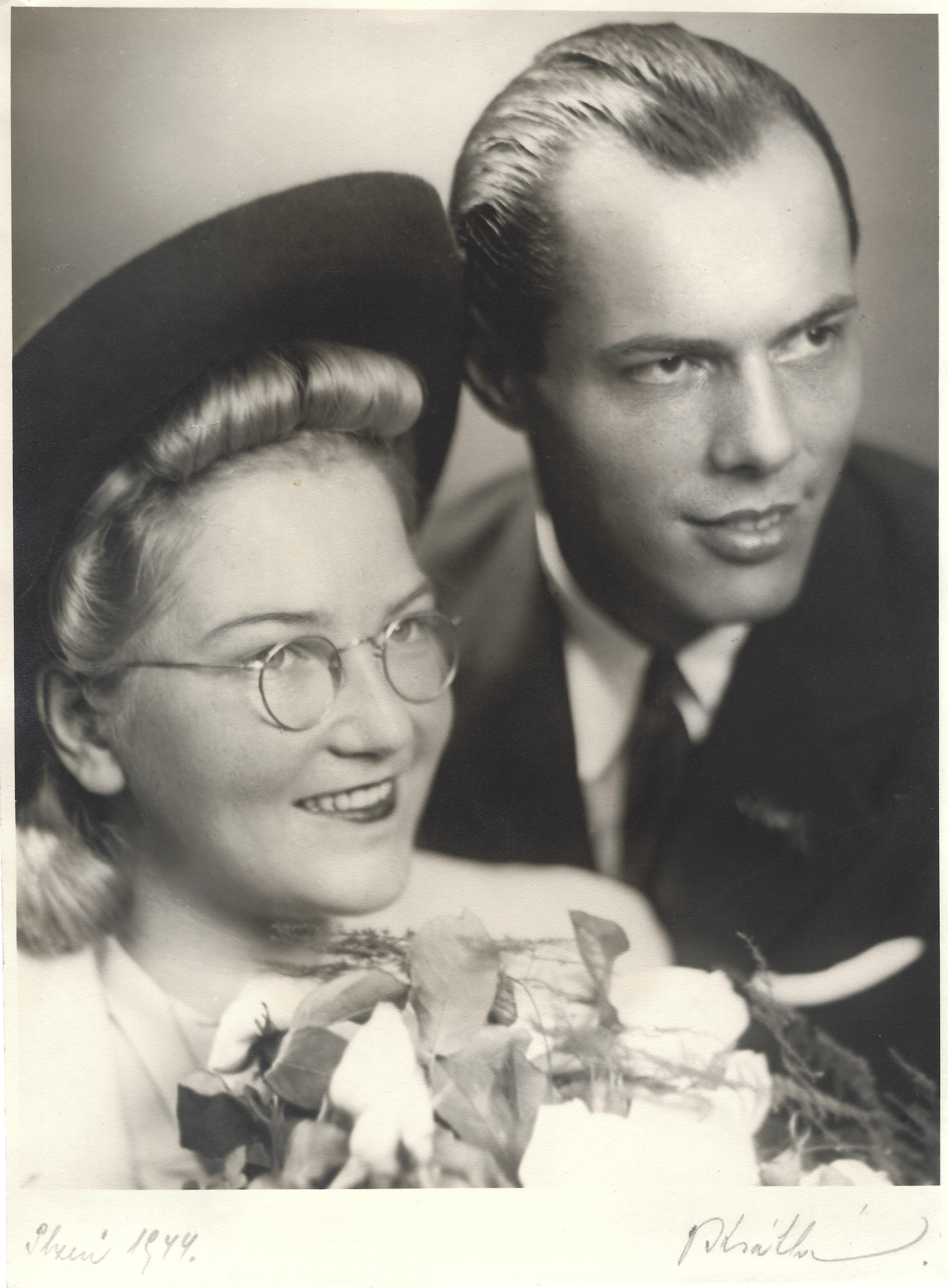 Rodiče